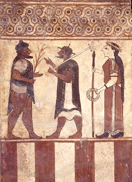 Etruscan Boccanera Plaques Cerveteri